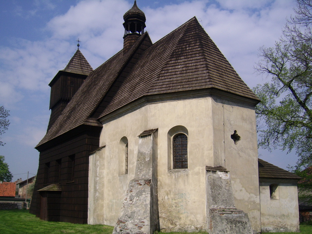 Kościół Ostropa w Gliwicach